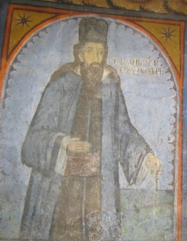 Фреска на поп Стоян Разловски като ктитор в църквата "Св. св. Константин и Елена" в Разловци